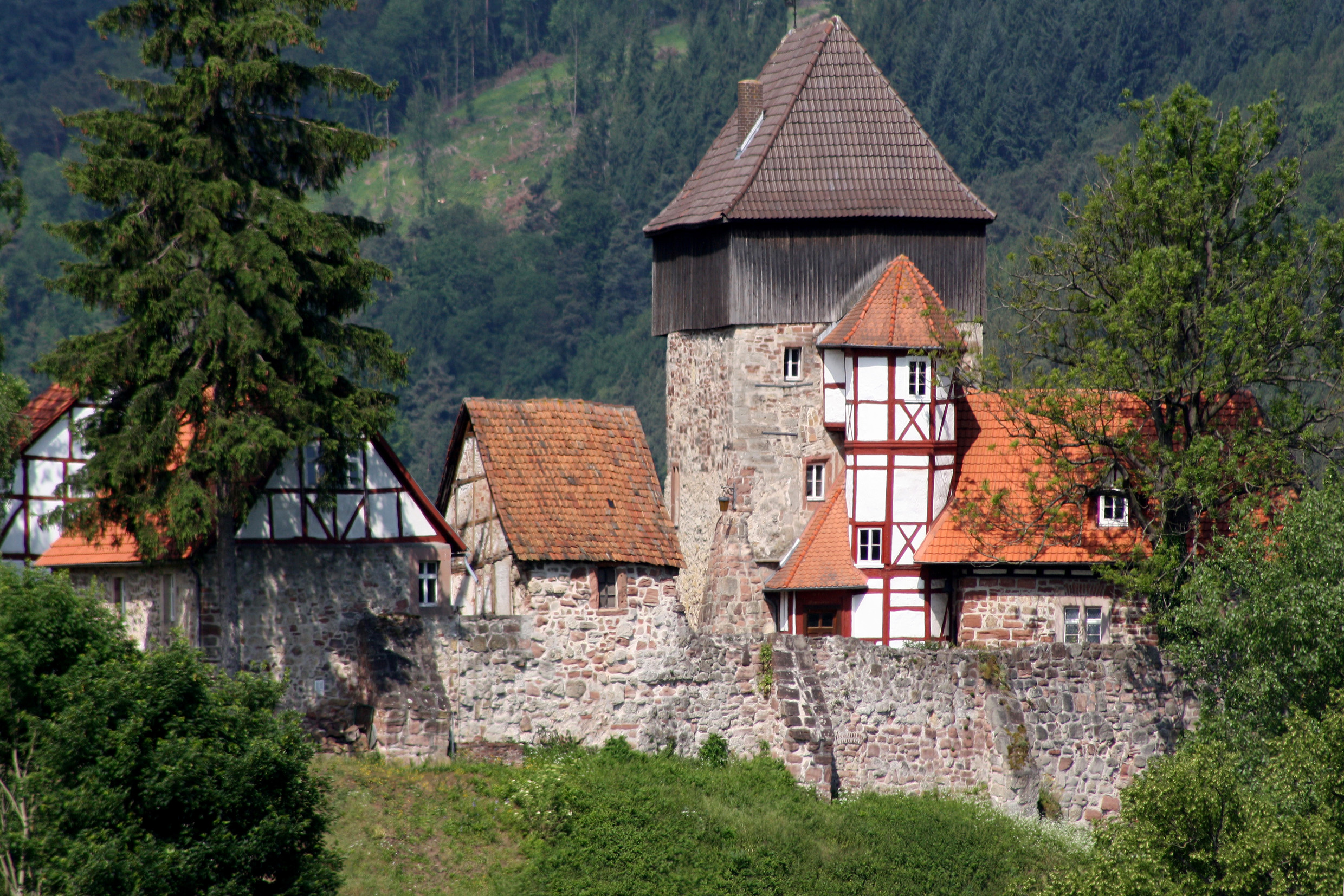 Ostseite